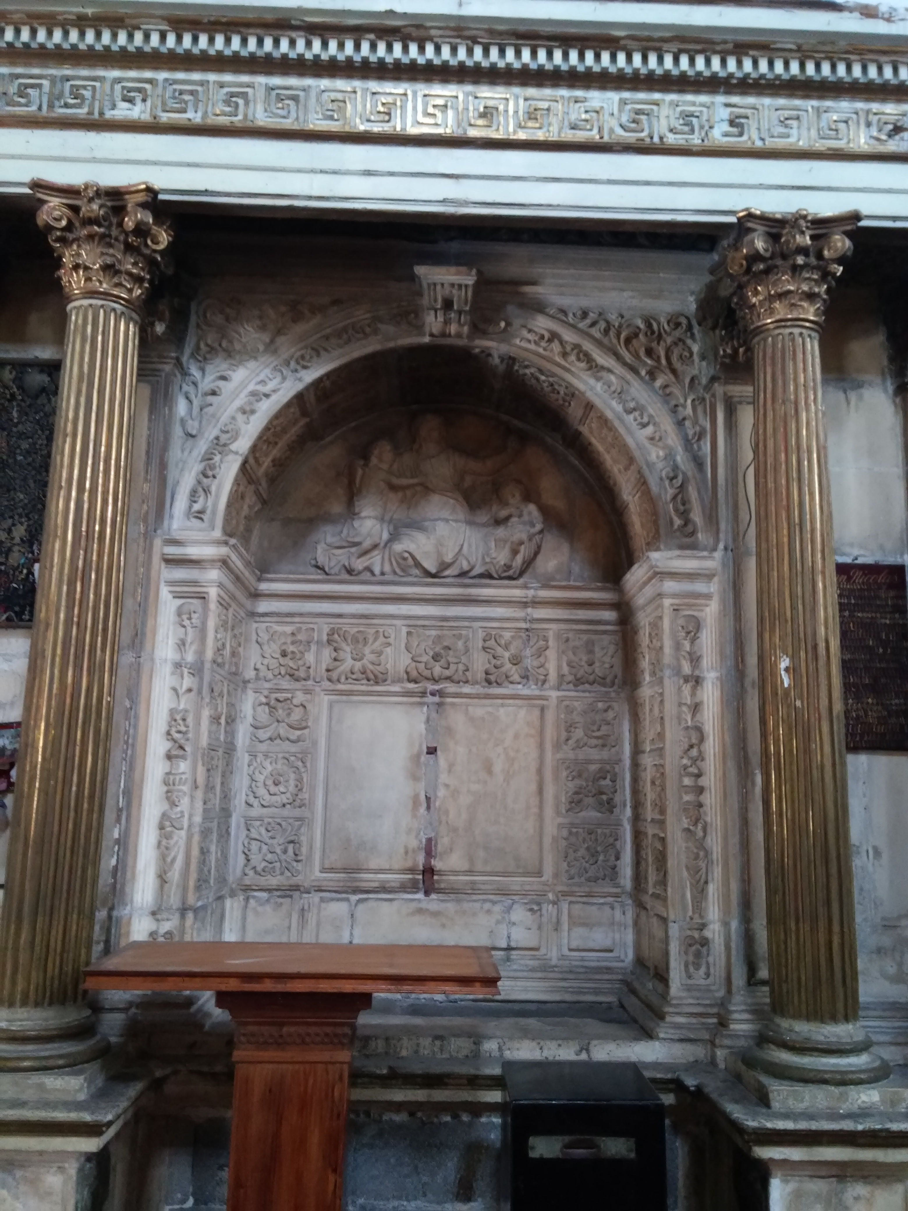 Detalles del Sepulcro de Alonso de Villaseca en la iglesia e San Miguel arcángel en el Centro histórico de la Ciudad de México